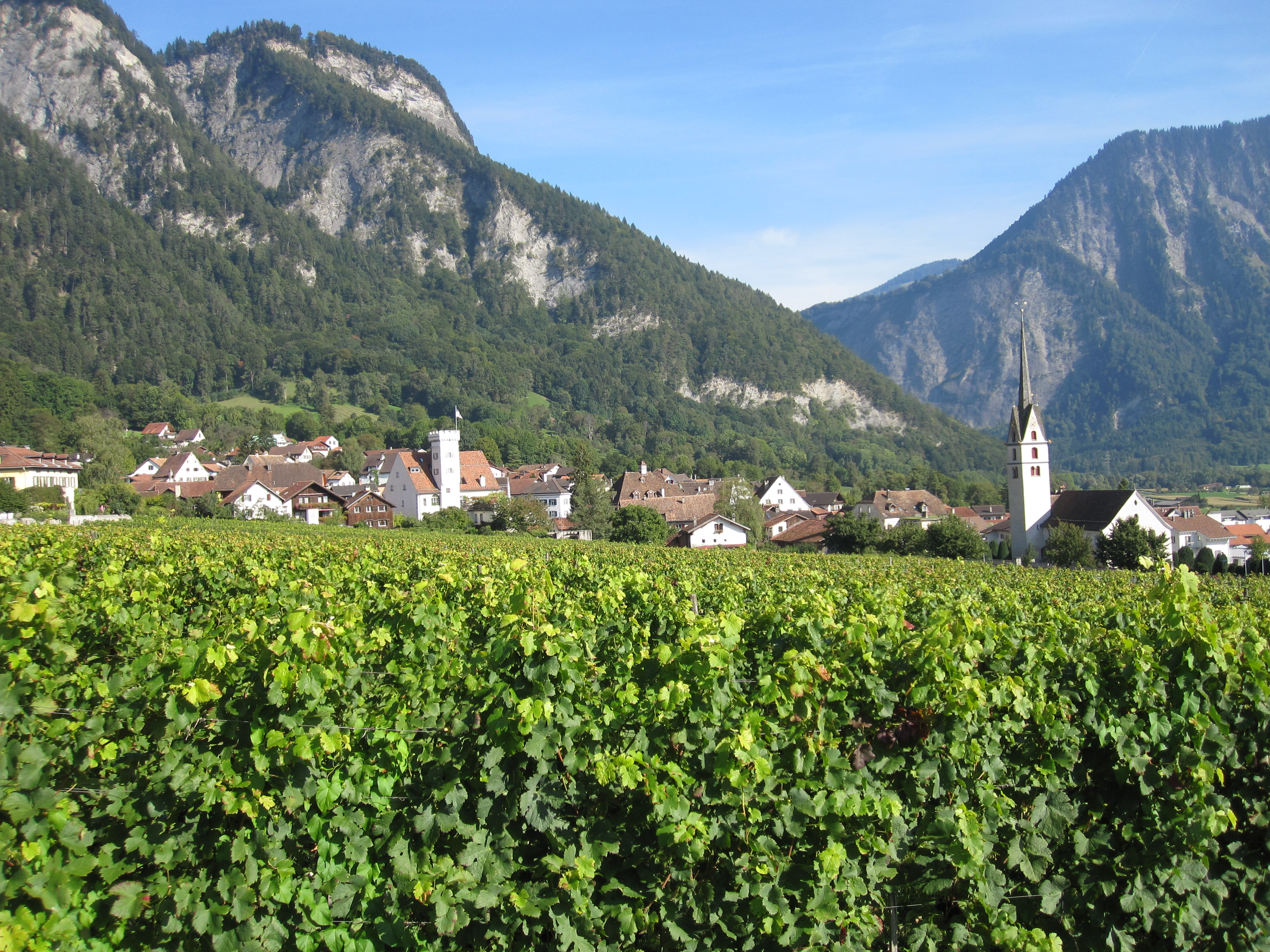 Malans im Kanton Graubünden